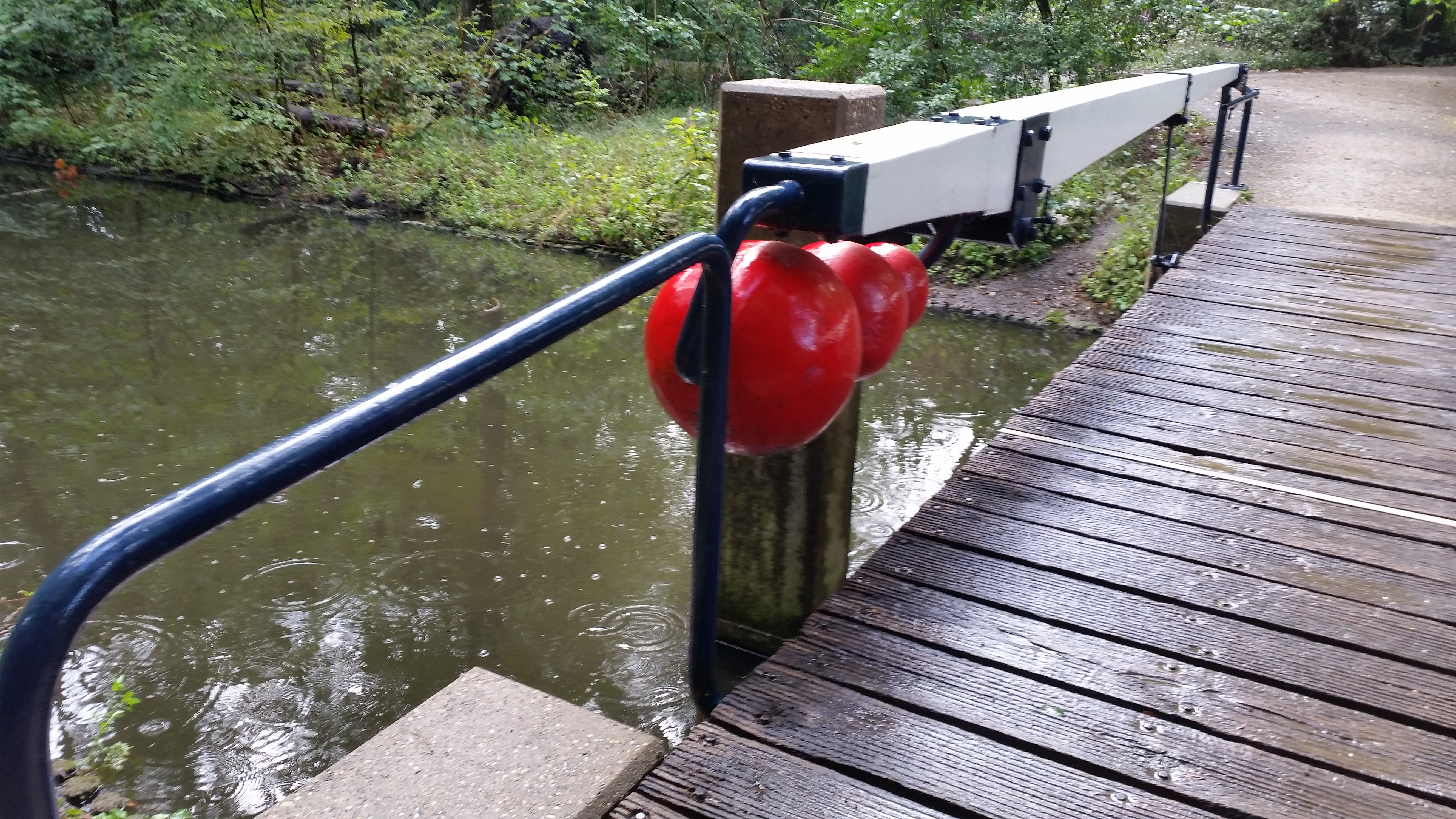 Brug 548 (in Amsterdam), ballen en balanspriem